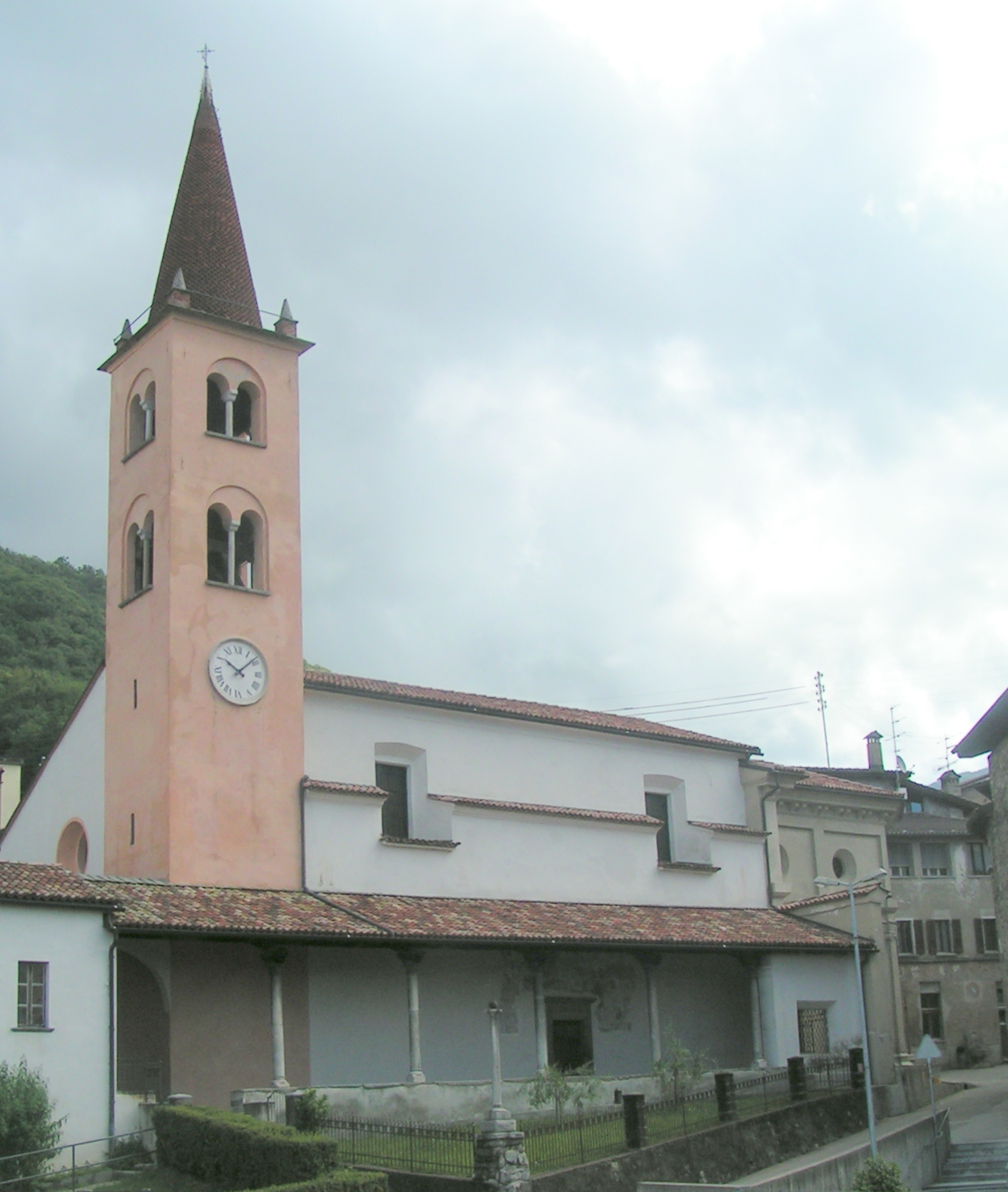 Foto della Chiesa di San Giovanni Battista a Sonvico